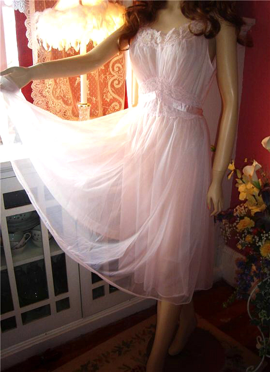 Negligee